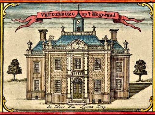 Huis Vredenburg in Hoogezand, detail van de "Kaart of Landtafereel der Provincie van Groningen en Ommelanden"